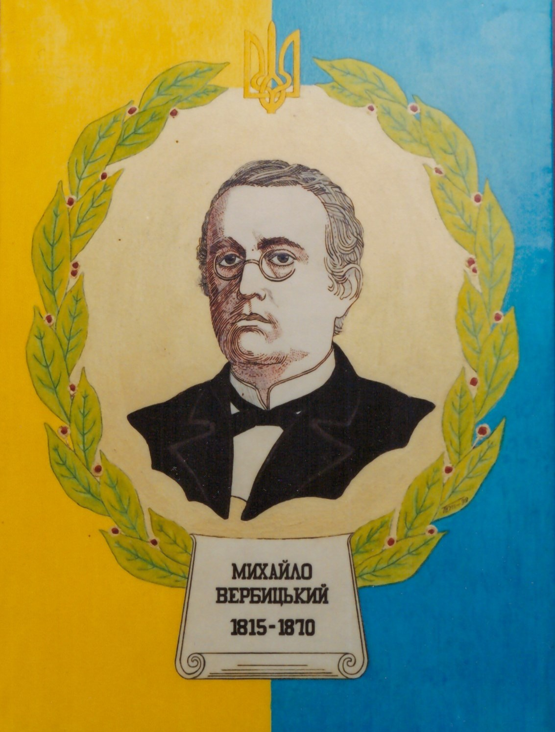 Плакат. Михайло Вербицький. Серія «Літературні пам’ятки України». 1999. Скульптор Таранченко В.О. Папір, туш, гуаш, бронзовий порошок, дерево. 60 х 43 х 2,5.